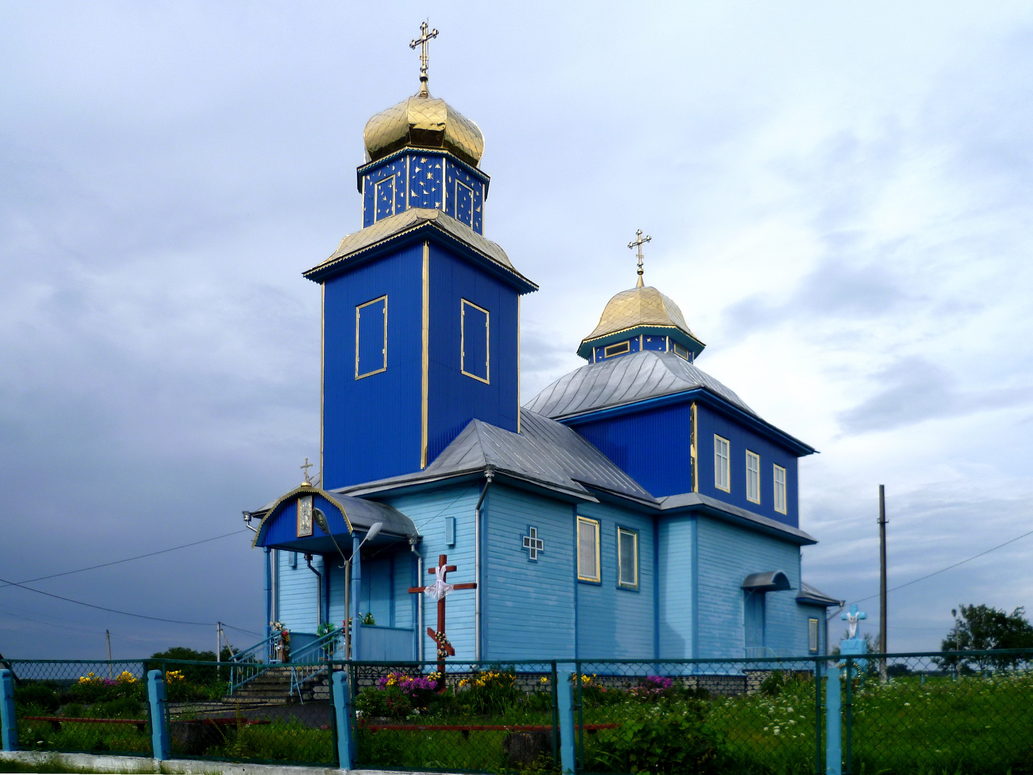 Михайлівська церква (1930 р.) - вигляд з південного заходу - с.Біличі Іваничівський район Волинська область Україна